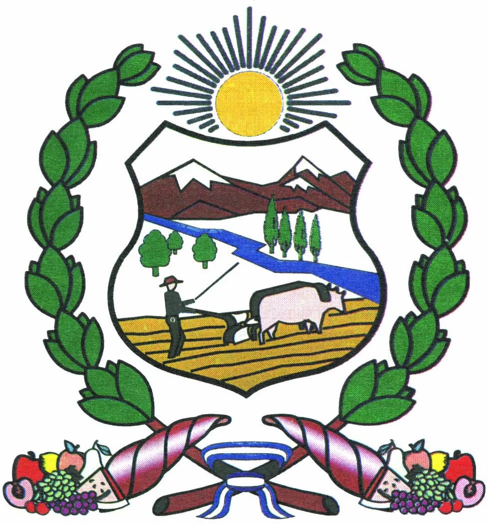 Escudo municipal de San Rafael, Mendoza